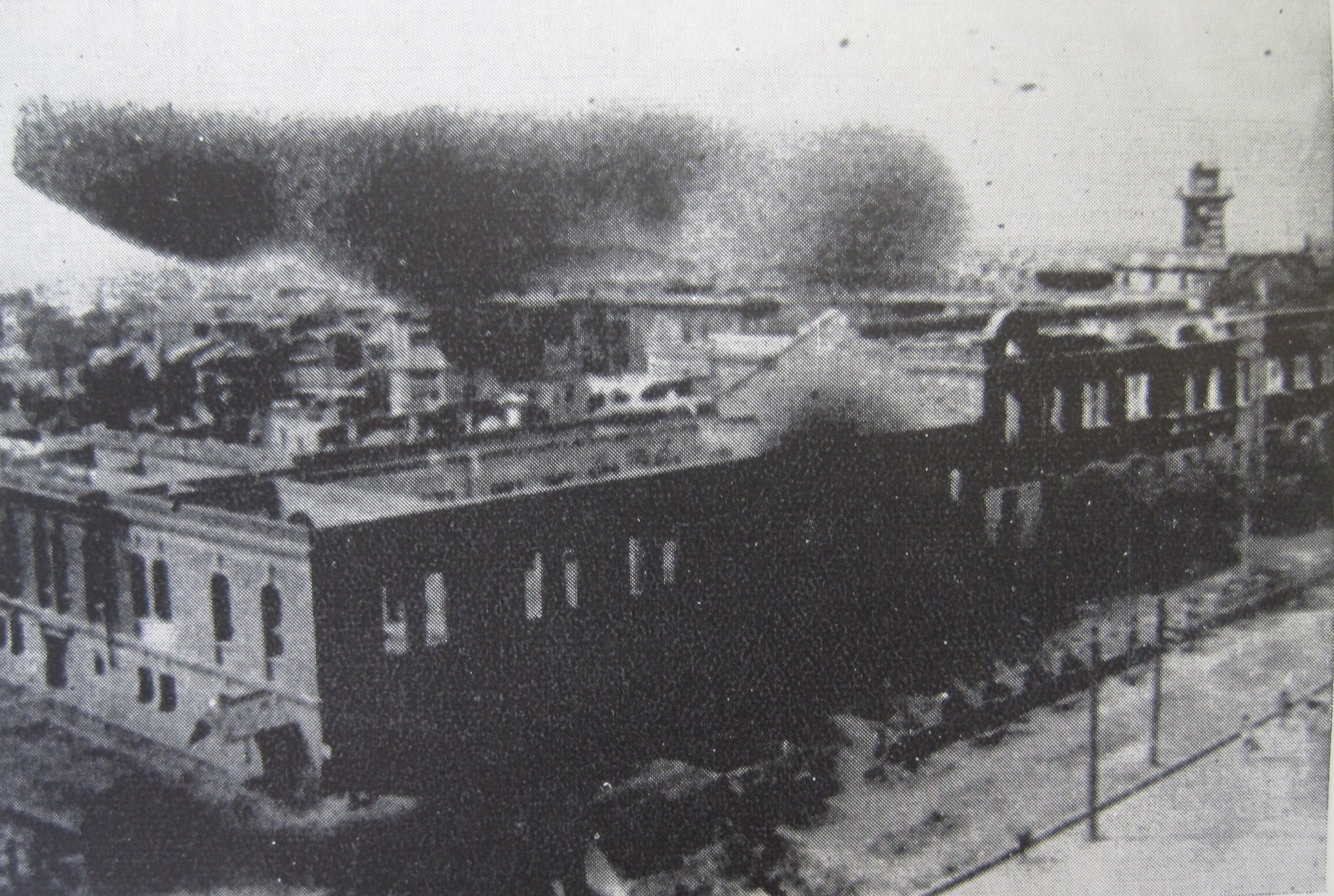 第二次世界大戰中被轟炸後的臺南州廳。